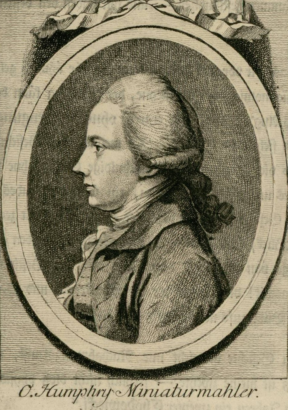 Portrait von Ozias Humphry; Stich aus Lavaters Physiognomischen Fragmenten.